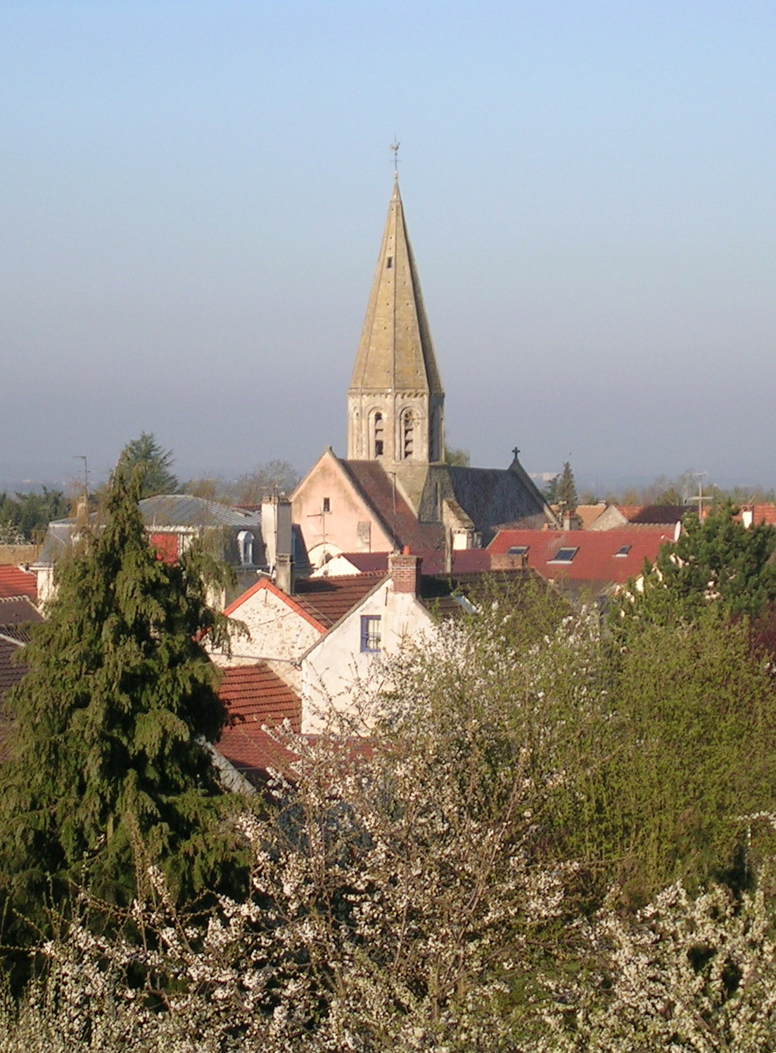 C'est une photo prise moi meme. On y voit l'église de Feucherolles